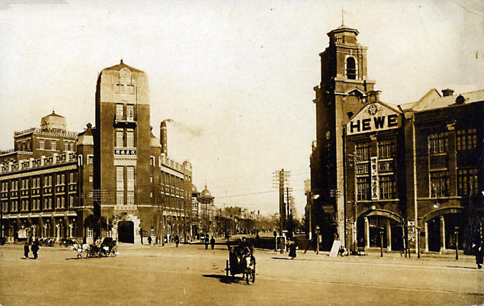 中文（中国大陆）: 奉天浪速通